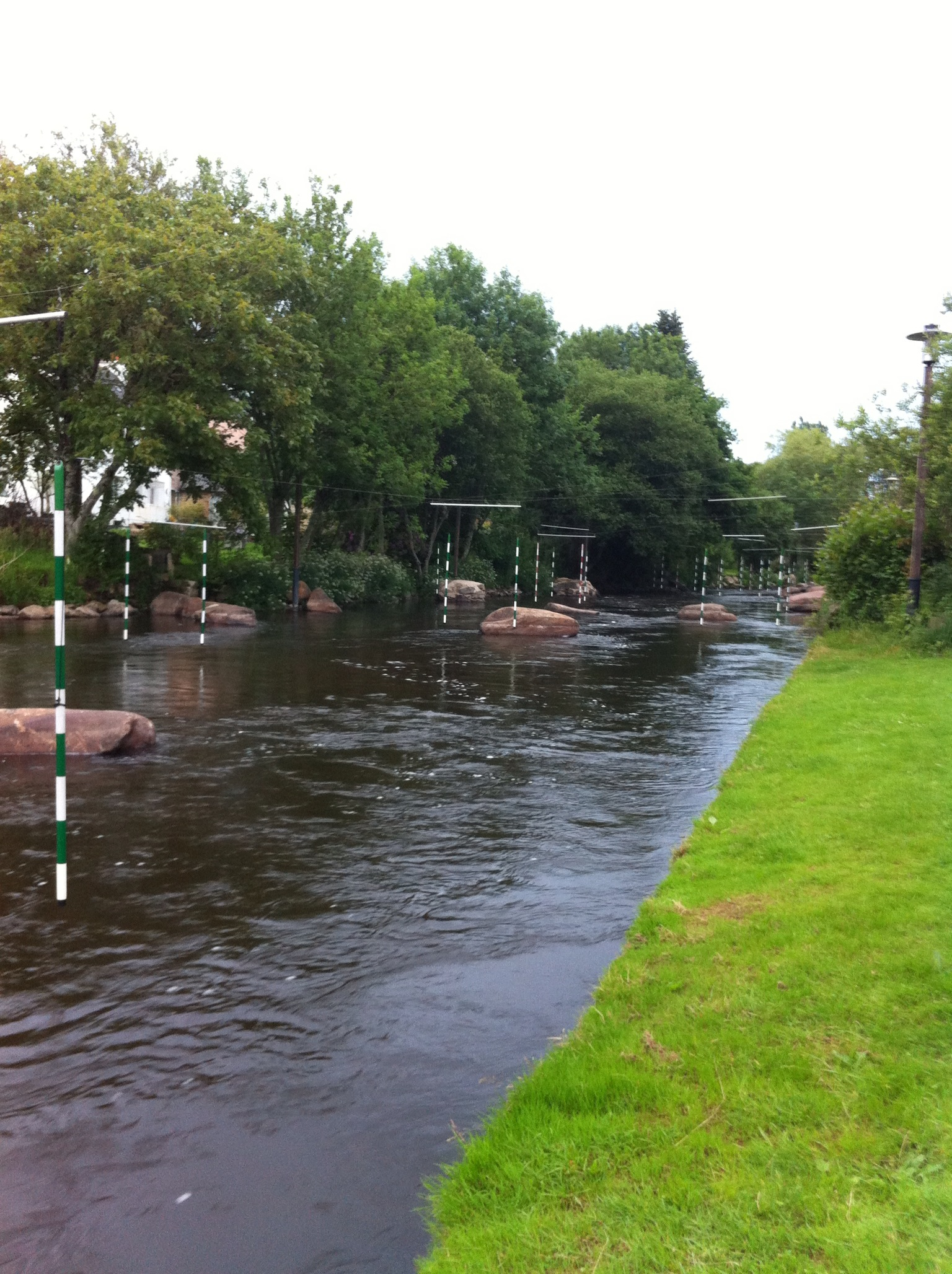 Locastel